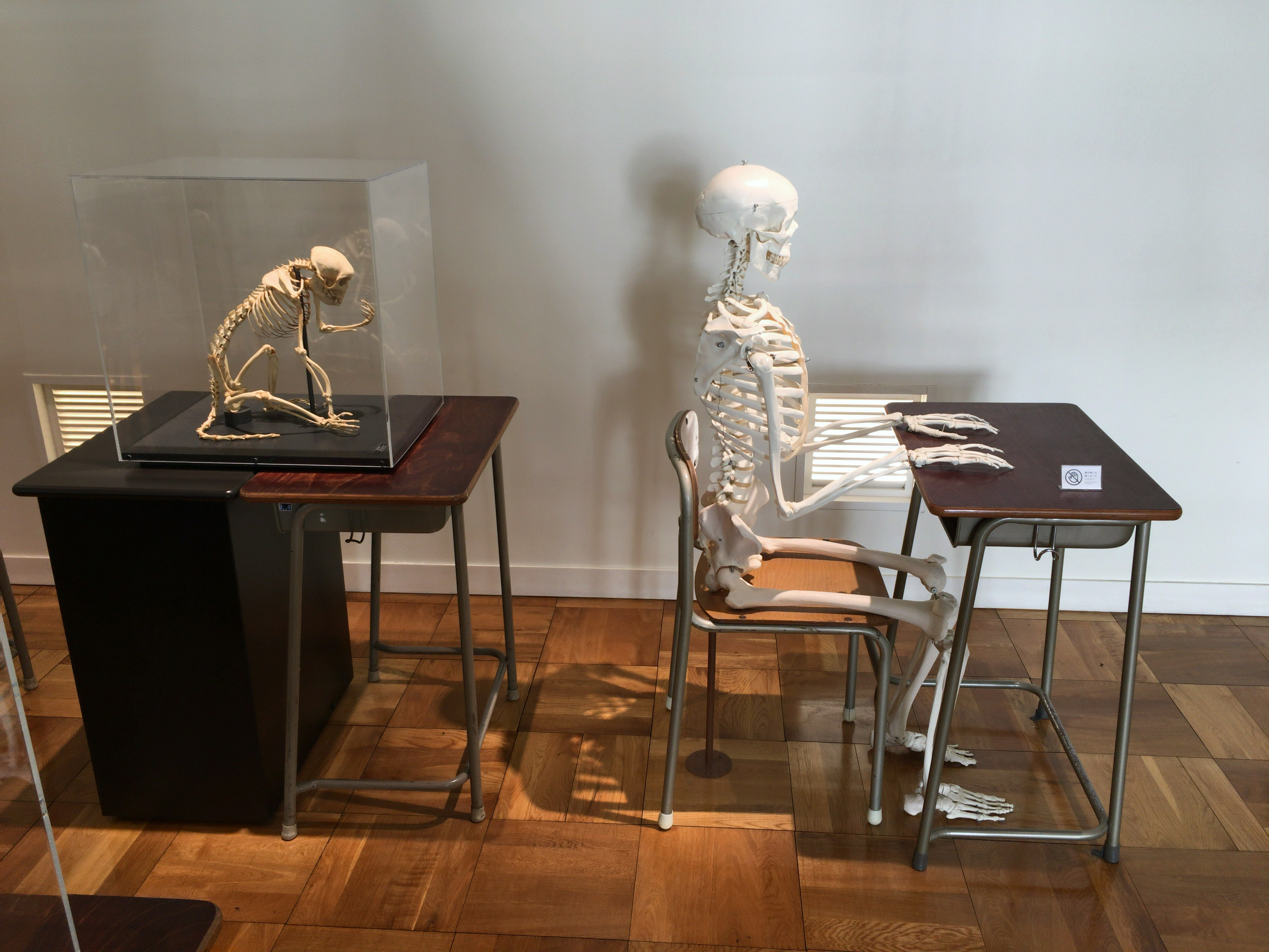 ふじのくに地球環境史ミュージアム(静岡県静岡市駿河区）展示室8